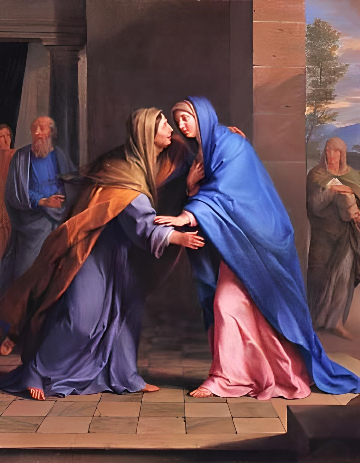 La Visitation.